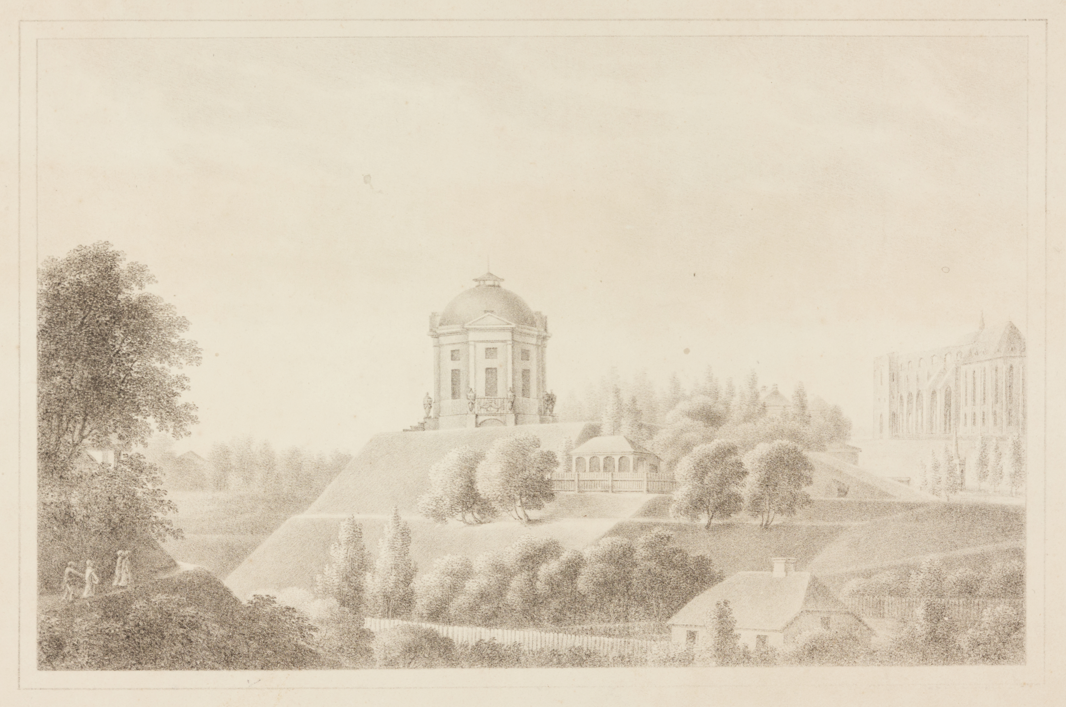 "Anatoomikum" (ca 1820). Litograafia paberil. Kujutise kõrgus 16,1 ja laius 26,0 cm; lehe kõrgus 24,6 ja laius 34,5 cm. This image on crowdsourcing geotagging platform Ajapaik MUIS:TKM TR 3995 G 1235